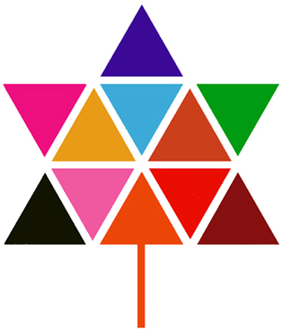 Centennial Symbol - Conception graphique par Stuart Ash - Toronto - 1967